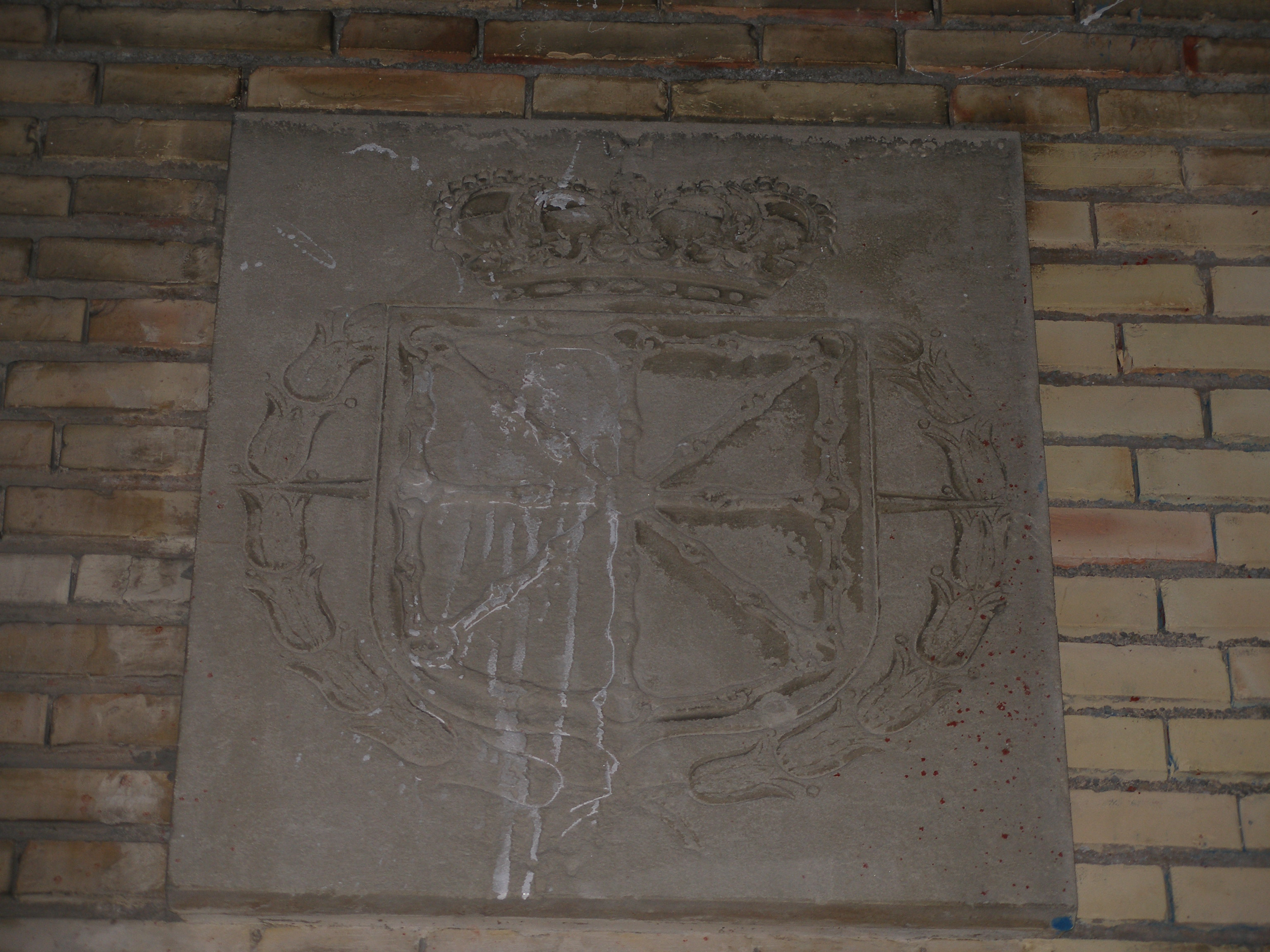 Escudo de Navarra con la Cruz Laureada de San Fernando.